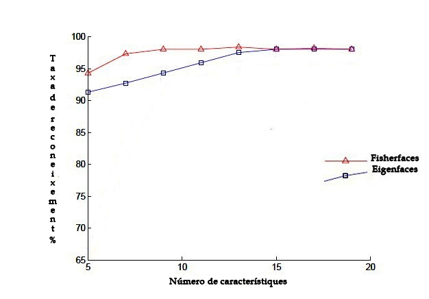 Comparació en funció del número de característiques-posició